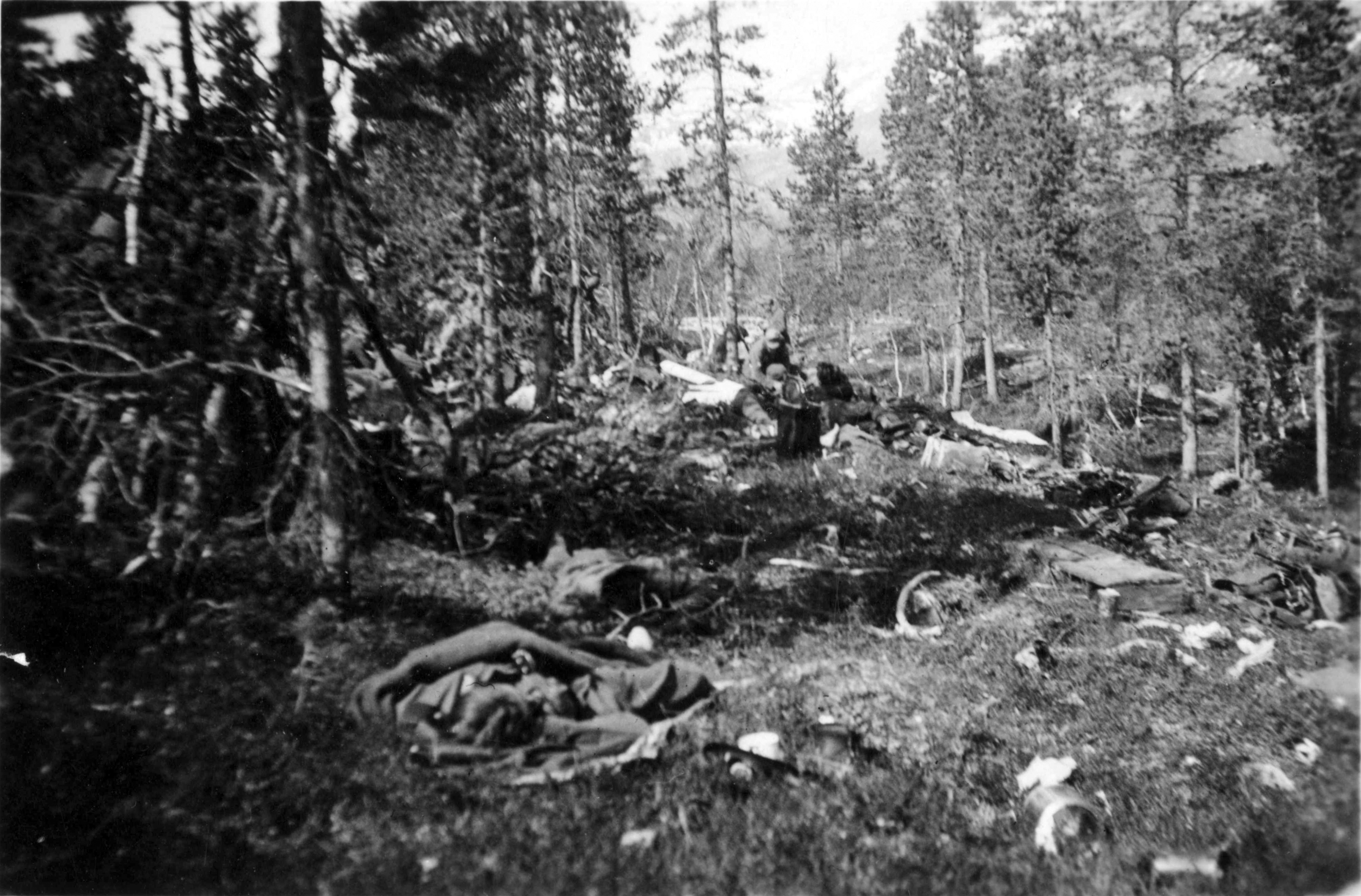 Engelske etterlatenskaper etter kampene ved Stien 17. mai 1940 Tittel / Title: Engelske etterlatenskaper Dato / Date: Ukjent/Unknown Fotograf / Photographer: Karl Marth/Otto Erlacher Sted / Place: Stien, Nordland, Norge Eier / Owner Institution: Arkiv i Nordland Lenke / Link: Arkiv i Nordland Arkivreferanse /Archive reference: AIN.NA143.0130 Fra Dag Skogheims Privatarkiv